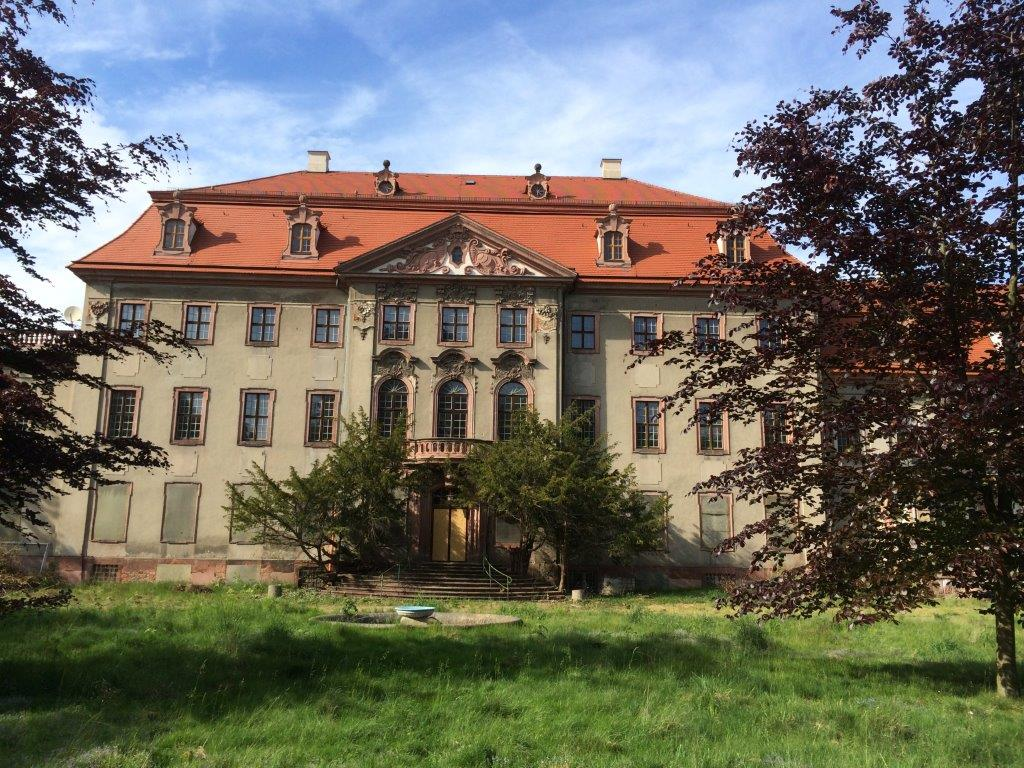 Das Schloss Brandis im Jahr 2014, kurz vor der Renovierung der Außenfassade